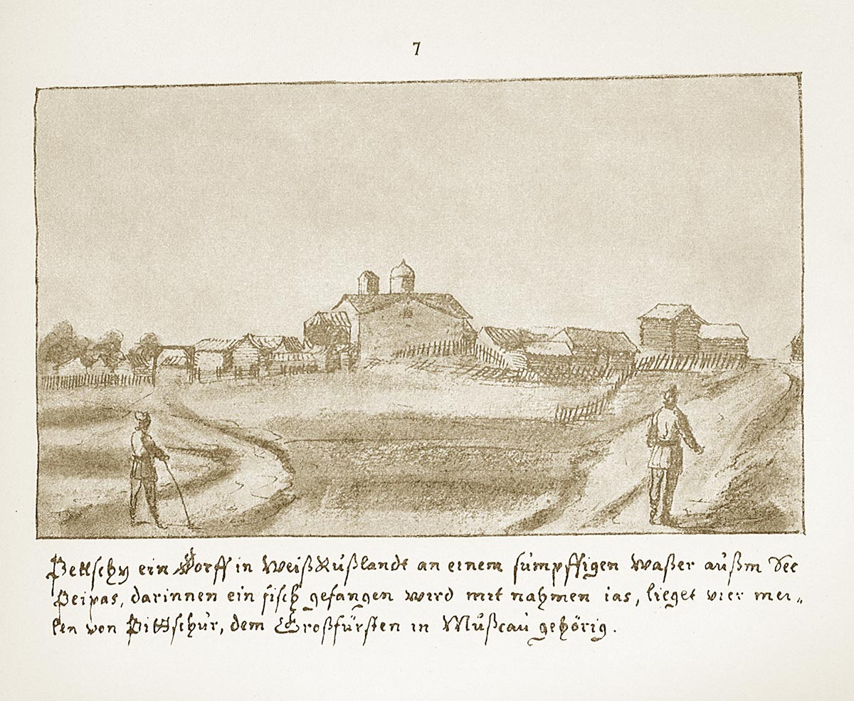 Печи